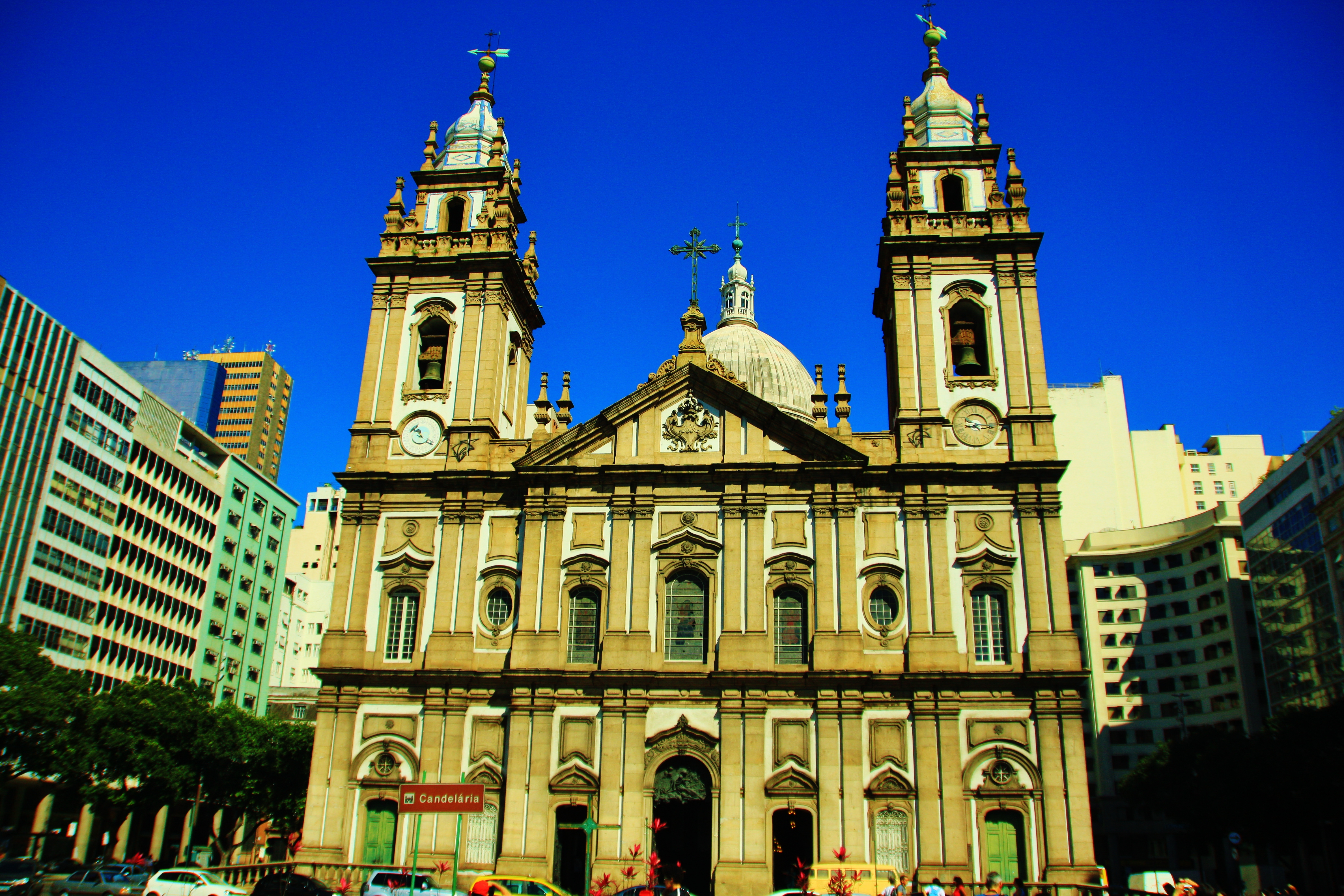 Igreja da Candelária